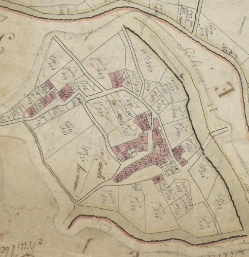 La Querola, de Mosset, en el Cadastre napoleònic del 1812 (Arxius Departamentals dels Pirineus Orientals)